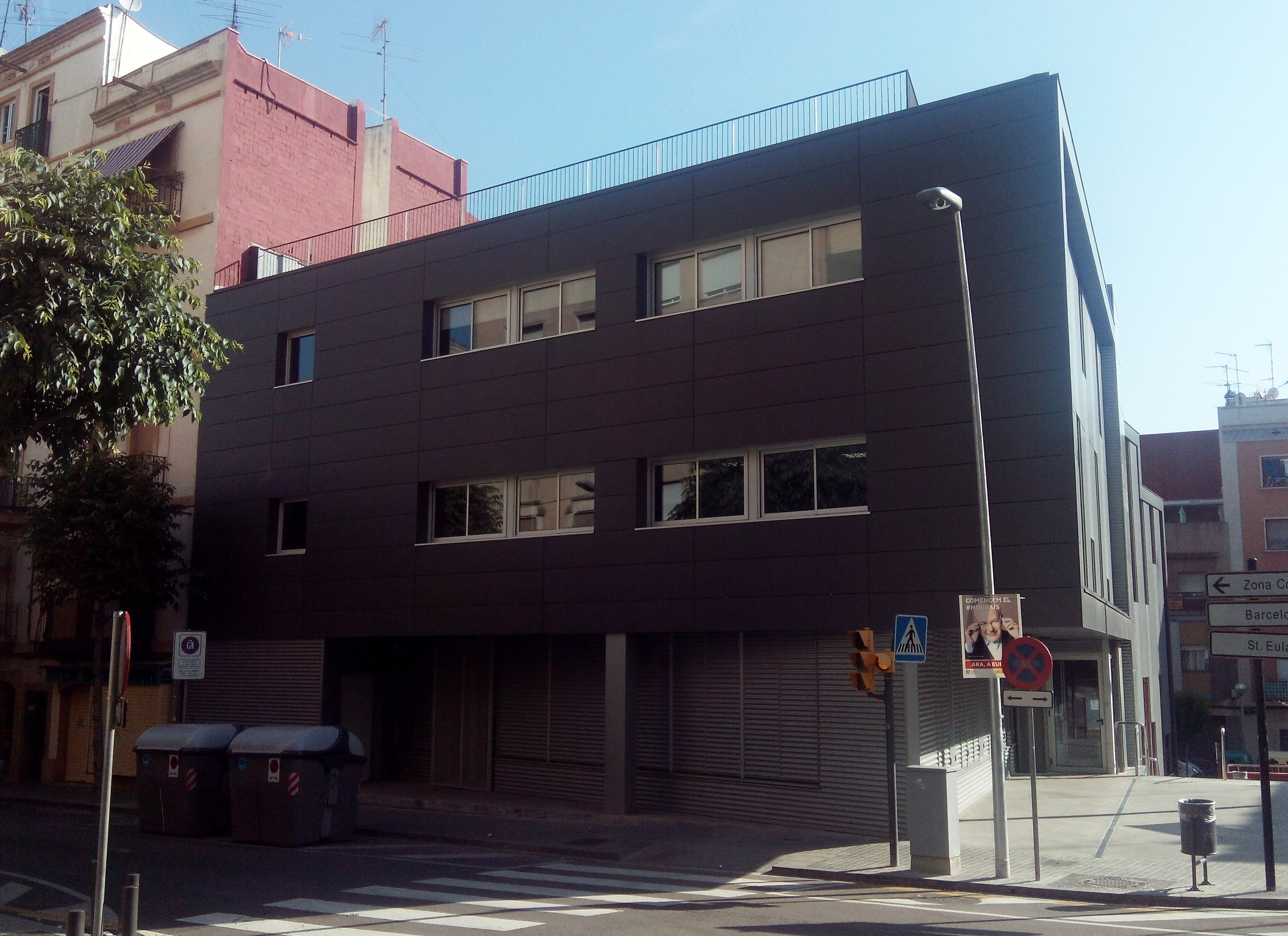 Equipament per a infants i joves del barri de la Torrassa situat a l'espai de l'antic Cinema Romero.